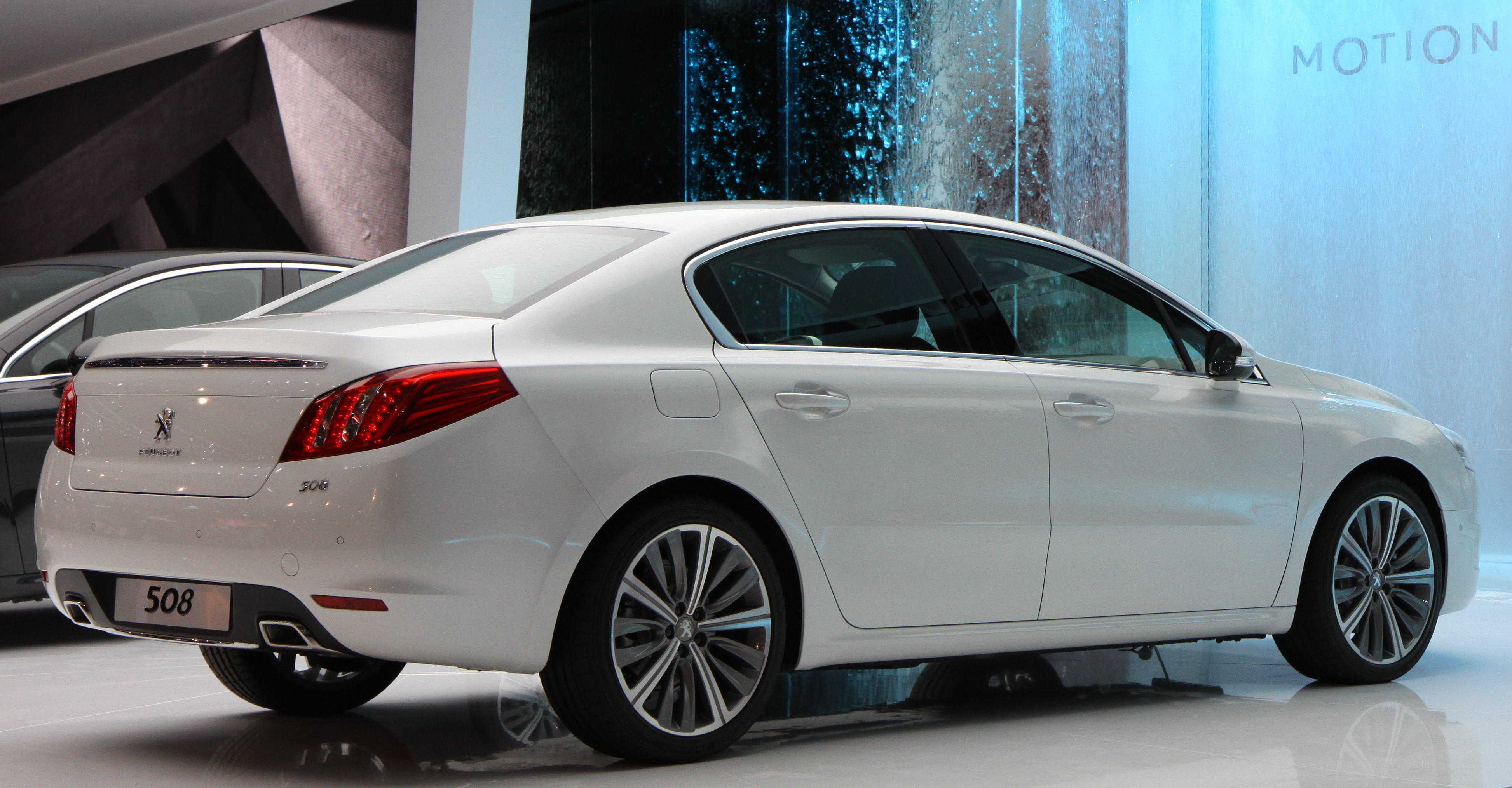 Paris - Mondial de l'automobile 2010